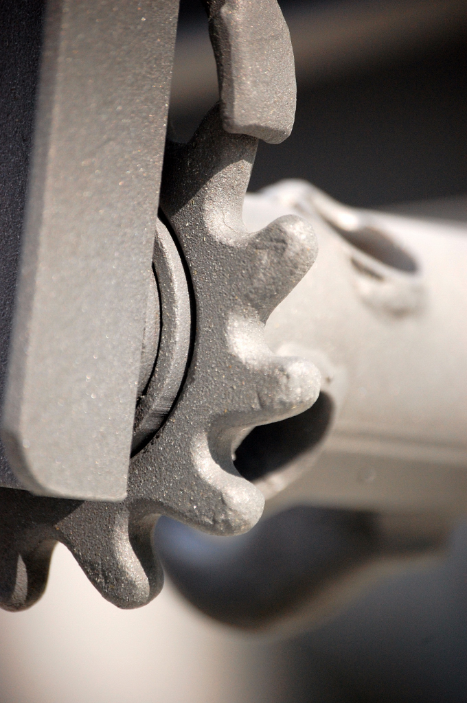 esempio di acciaio sabbiato